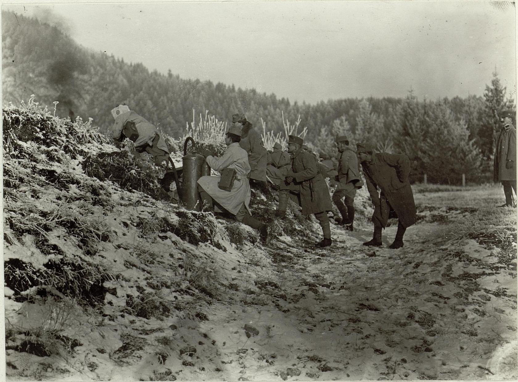 Übung mit einem Flammenwerfer